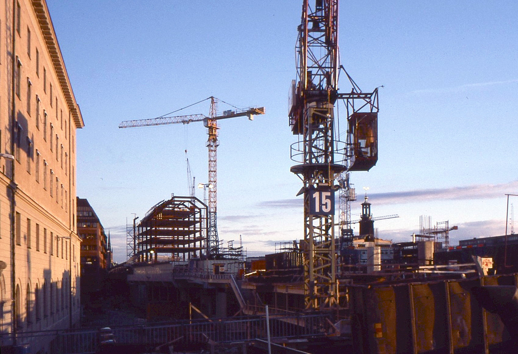 Cityterminalen och World Trade Center i Stockholm byggs, vy från Kungsbron mot söder, november 1985